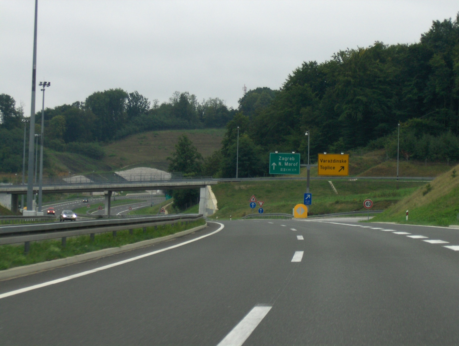 A4 Varaždinske Toplice exit